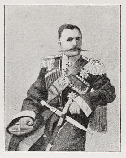 Данное изображение было использовано в статье «Алиханов-Аварский, Максуд» опубликованной во втором томе «Военной энциклопедии», который был издан книгоиздательским товариществом Ивана Дмитриевича Сытина в 1911 году в столице Российской империи городе Санкт-Петербурге.